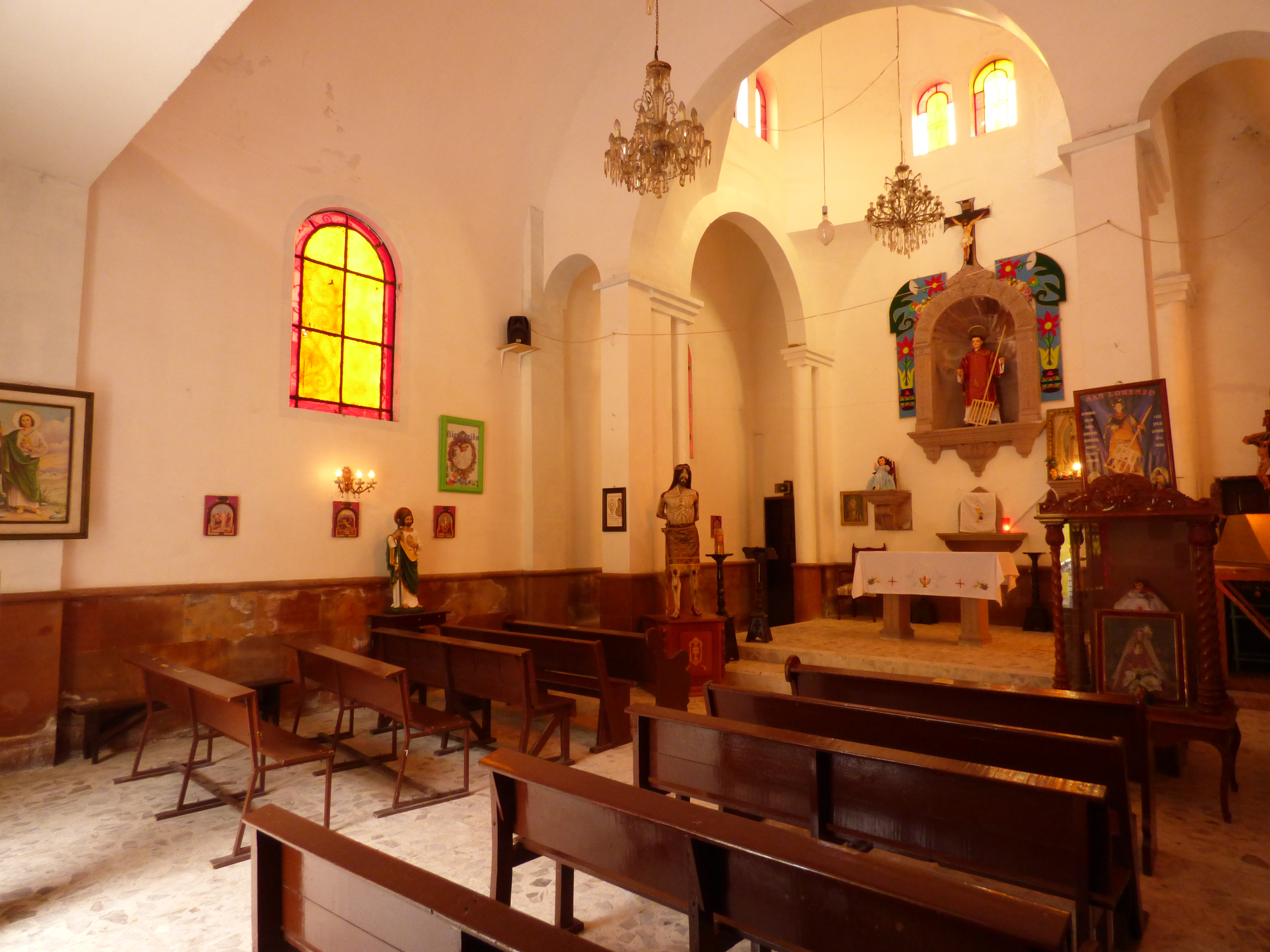 Interior de la capilla de San Lorenzo, compuesto por diez banca de metal color café, diversos cuadros del Viacrusis, imágenes de diversas vírgenes entre ellas Virgen de Guadalupe, y en el centro la imagen del patrono San Lorenzo.Barrio de San Lorenzo, Delegación Xochimilco, Ciudad de México.